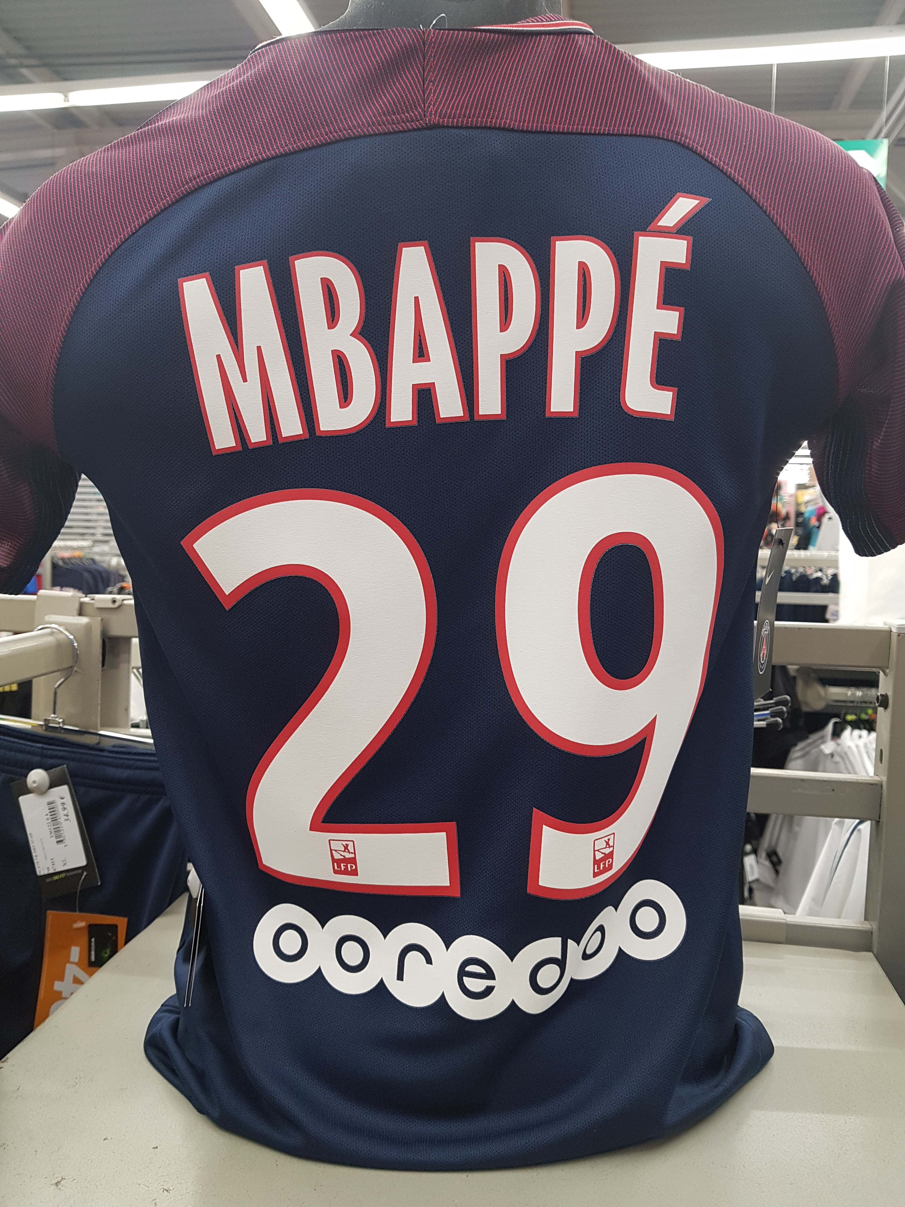 Maillot domicile de la saison 2017-2018 du Paris Saint-Germain floqué au nom de Kylian Mbappé.